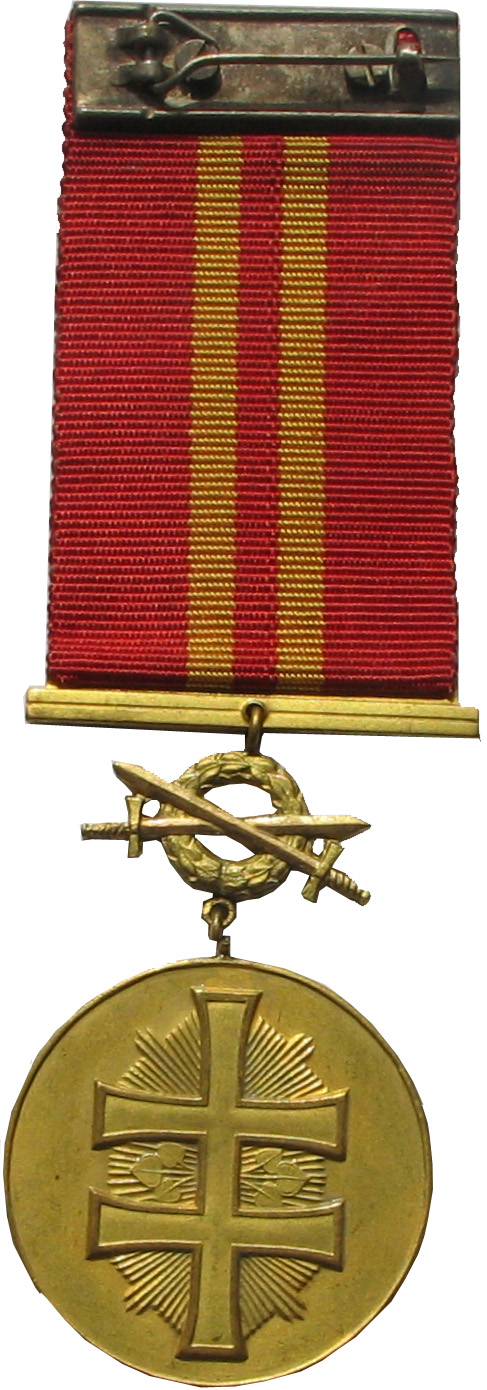 Vojenný víťazný kríž - medaila - 5. triedy Slovenskej republiky 1939 - 1944. Jej autorom bol Anton Hám, Štefan Ondrkal a Štefan Grosch